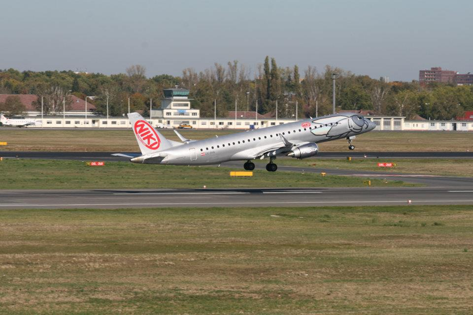 Eine Niki-Fly-Maschine beim Start auf der Piste 08R